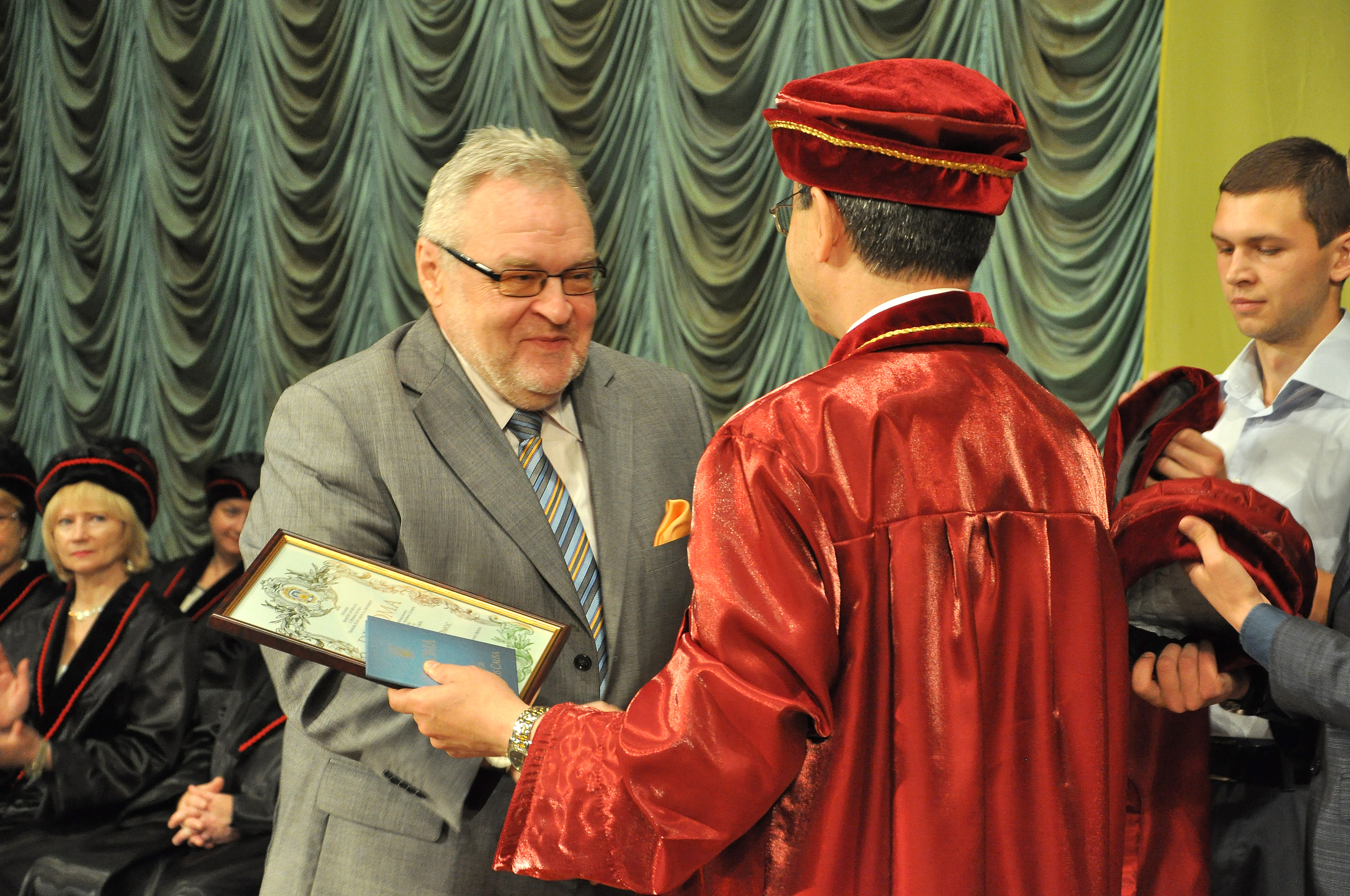 Ректор Михайло Корда вручає звання почесного професора ТДМУ Альфреду Антоні Овоцу під час вручення дипломів випускникам ТДМУ 2016 року.